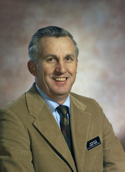 Washington State Rep Albert Bauer